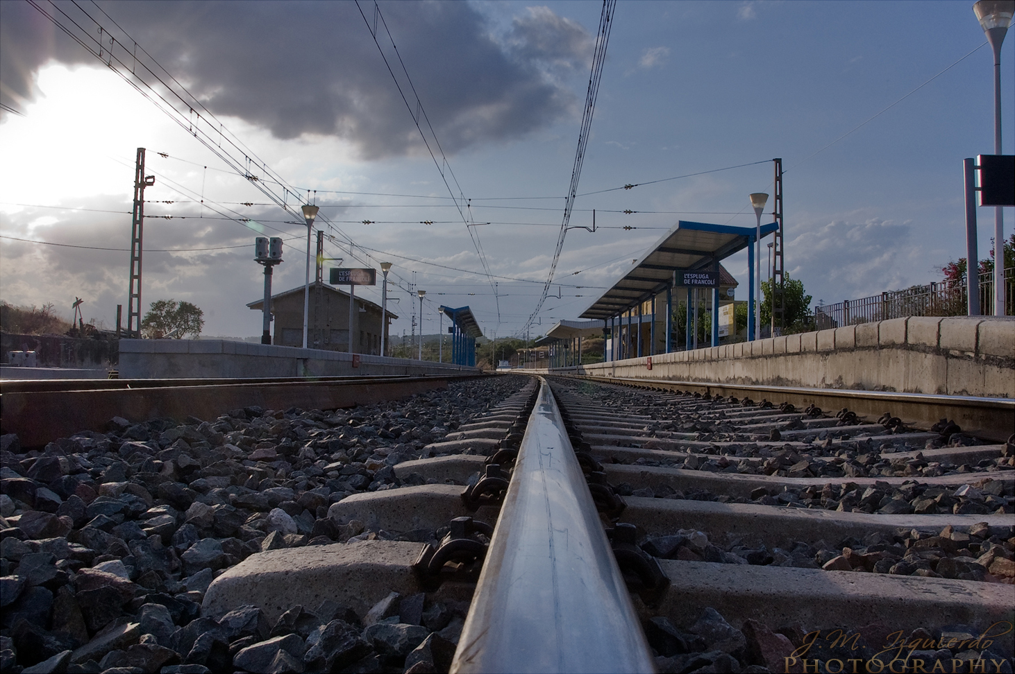 Nikon D40 + Sigma 18-200 DC OS HSM 1/200s - F/22 - 18mm - ISO400